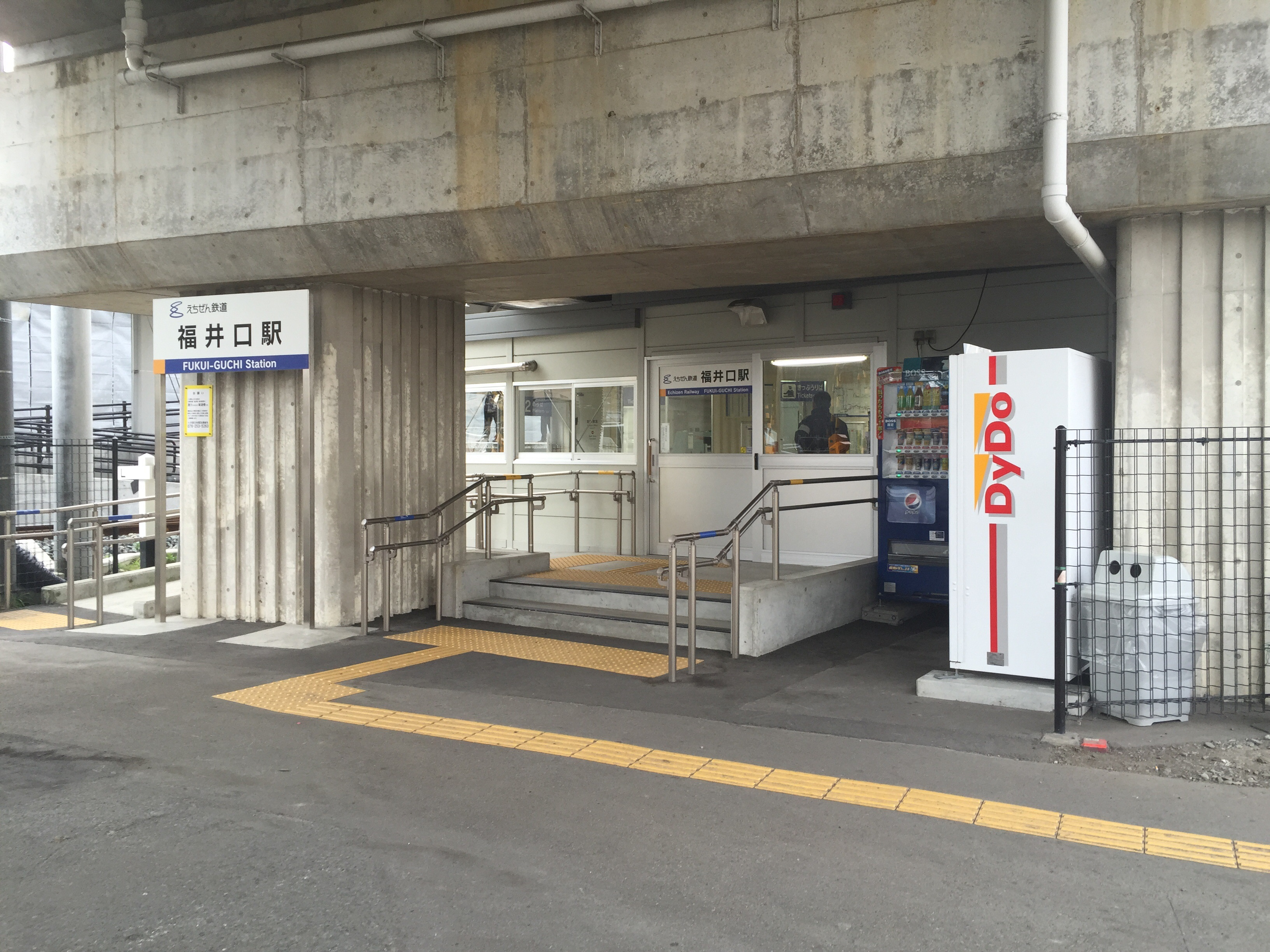 福井口駅 駅舎